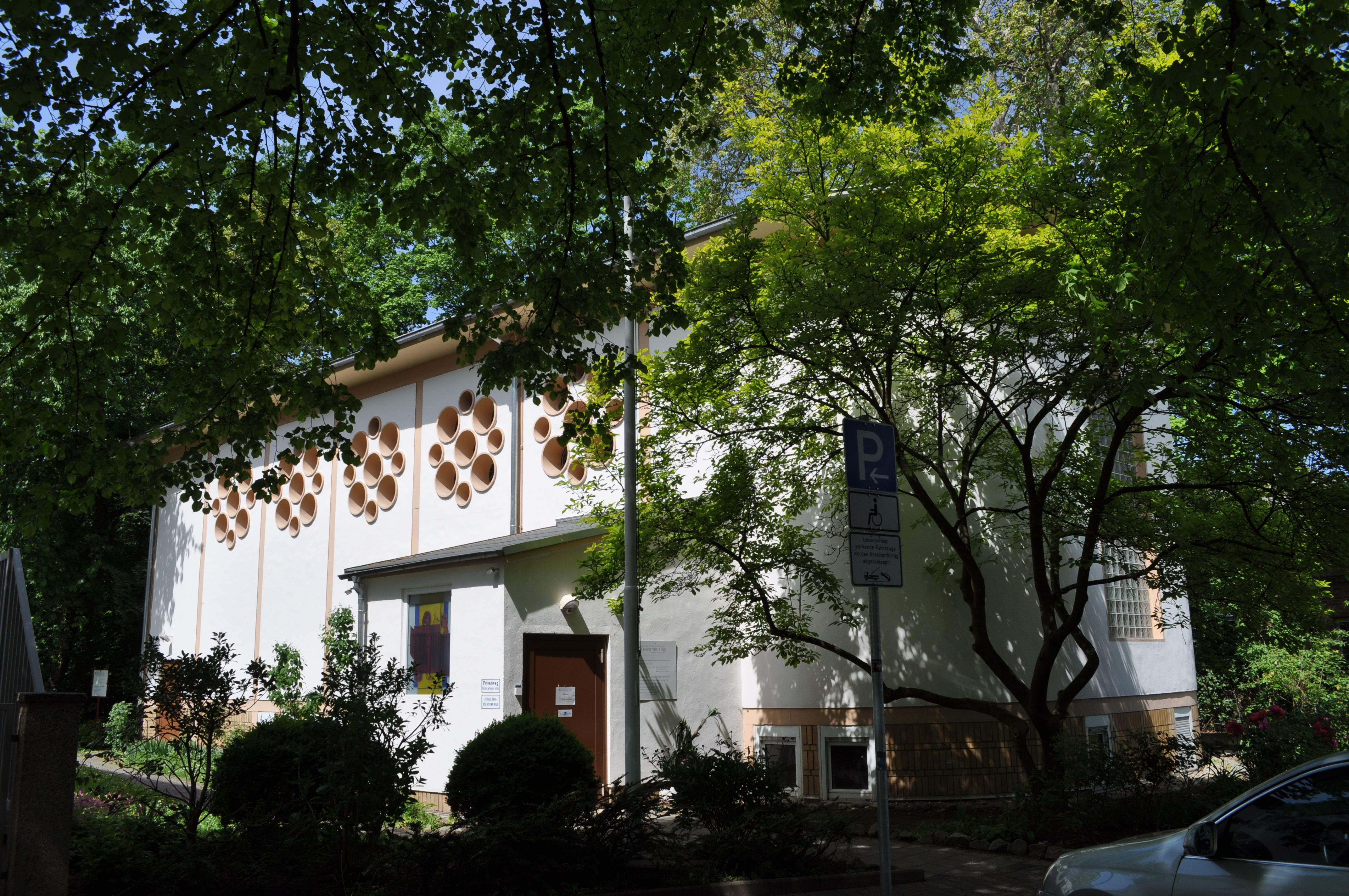 Frankfurt, Christ the King Kirche, Seite